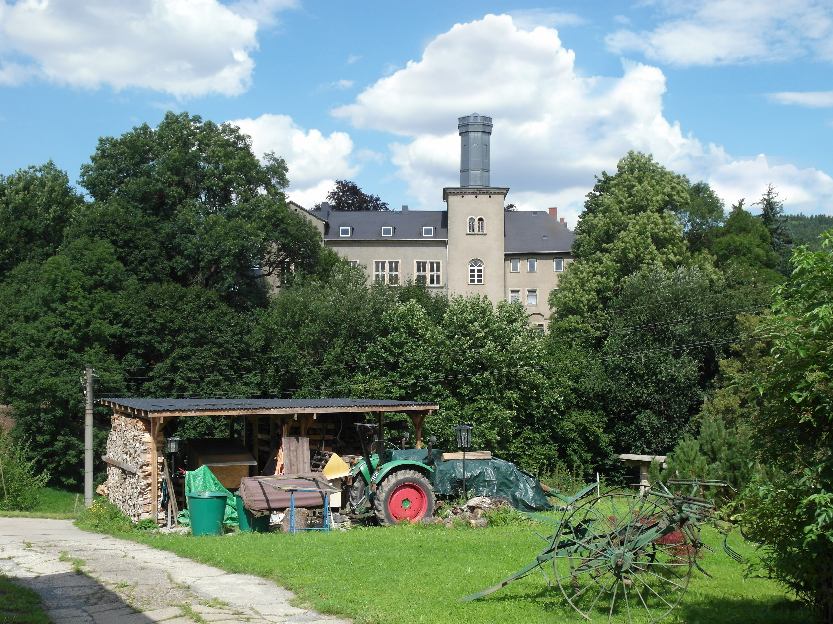 01.08.2016 09573 Erdmannsdorf (Augustusburg): Schloß, Rathausstr. 9 (GMP: 50.817917,13.076907). Sicht von Südwesten. Eine an dieser Stelle vermutlich um 1160 errichtete Wehranlage wurde im Jahr 1191 erstmals ur- kundlich als Herrensitz des Werner de Ertmarsdorf erwähnt. Als Besitzer lassen sich die Familien von Erdmannsdorff, von Schütz und von Könneritz nennen. Unter Hans Heinrich von Könneritz begann 1843 der Umbau zum Schloß in seiner heutigen Gestalt. Der Schloßanbau wurde im Stil der Tudorgotik ausgeführt, dessen Schmuckelemente jedoch um 1965 bei der Erneuerung des Außenputzes zerstört wurden. Als Wohnhaus genutzt. [SAM7378.JPG]20160801715DR.JPG(c)Blobelt